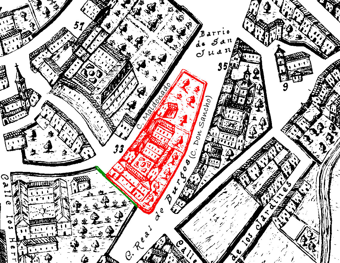 Información parcial del plano de Bentura Seco (1738). Señalado en rojo el edificio ya desaparecido del convento de la Merced Calzada de la ciudad de Valladolid en España.